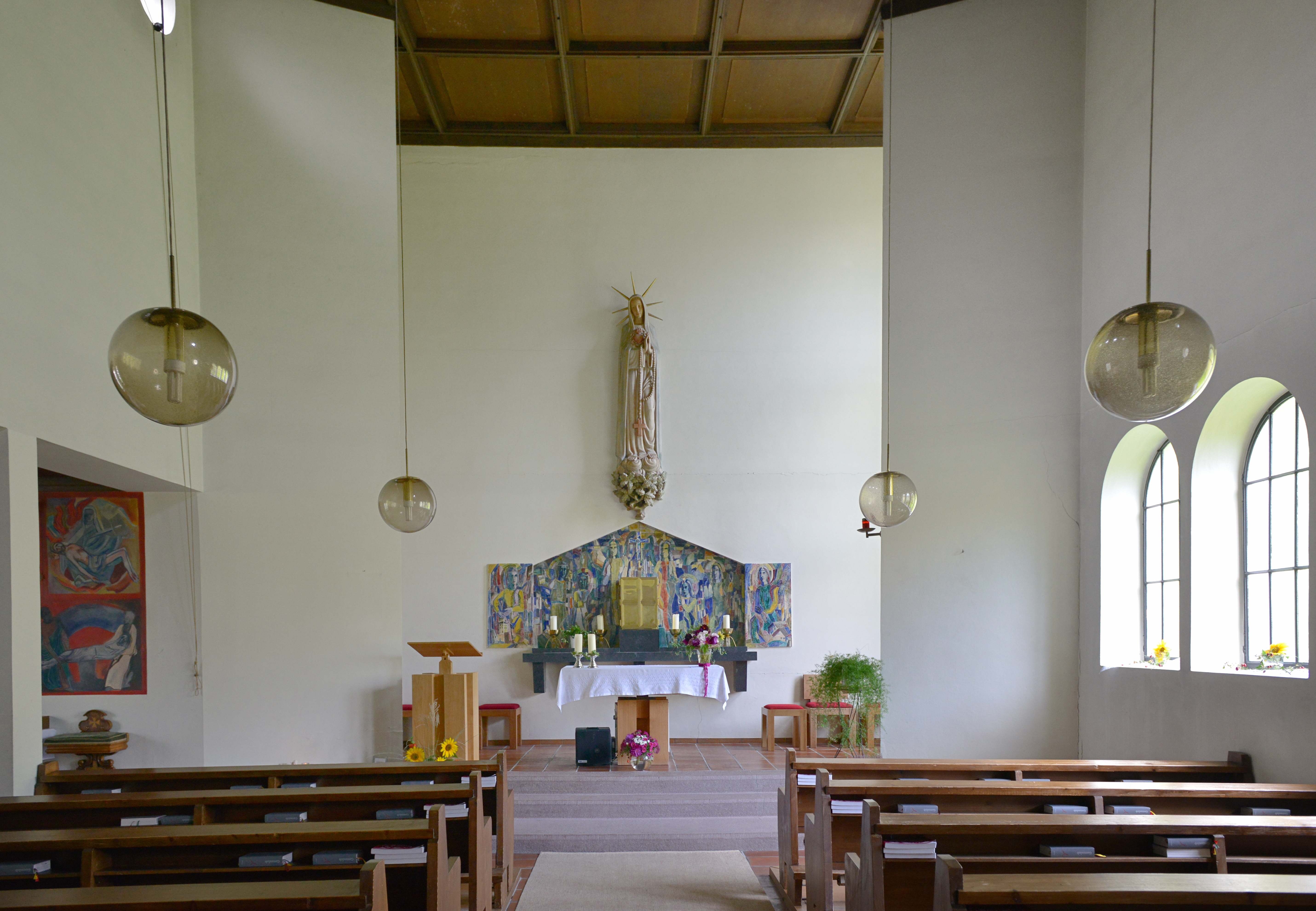 "Fatimakapelle" in Gütle in Dornbirn.